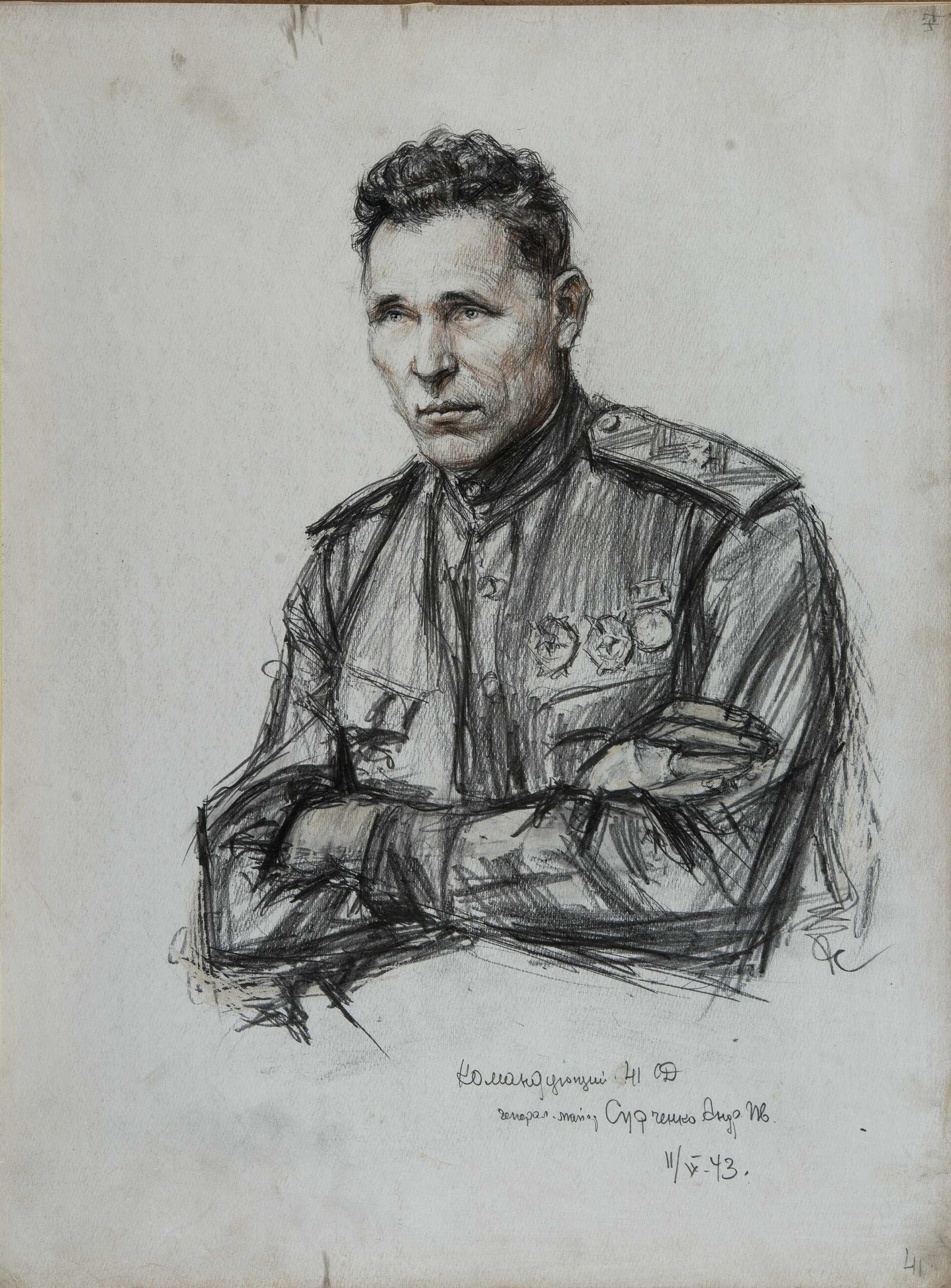 Сурченко Андрей Иванович